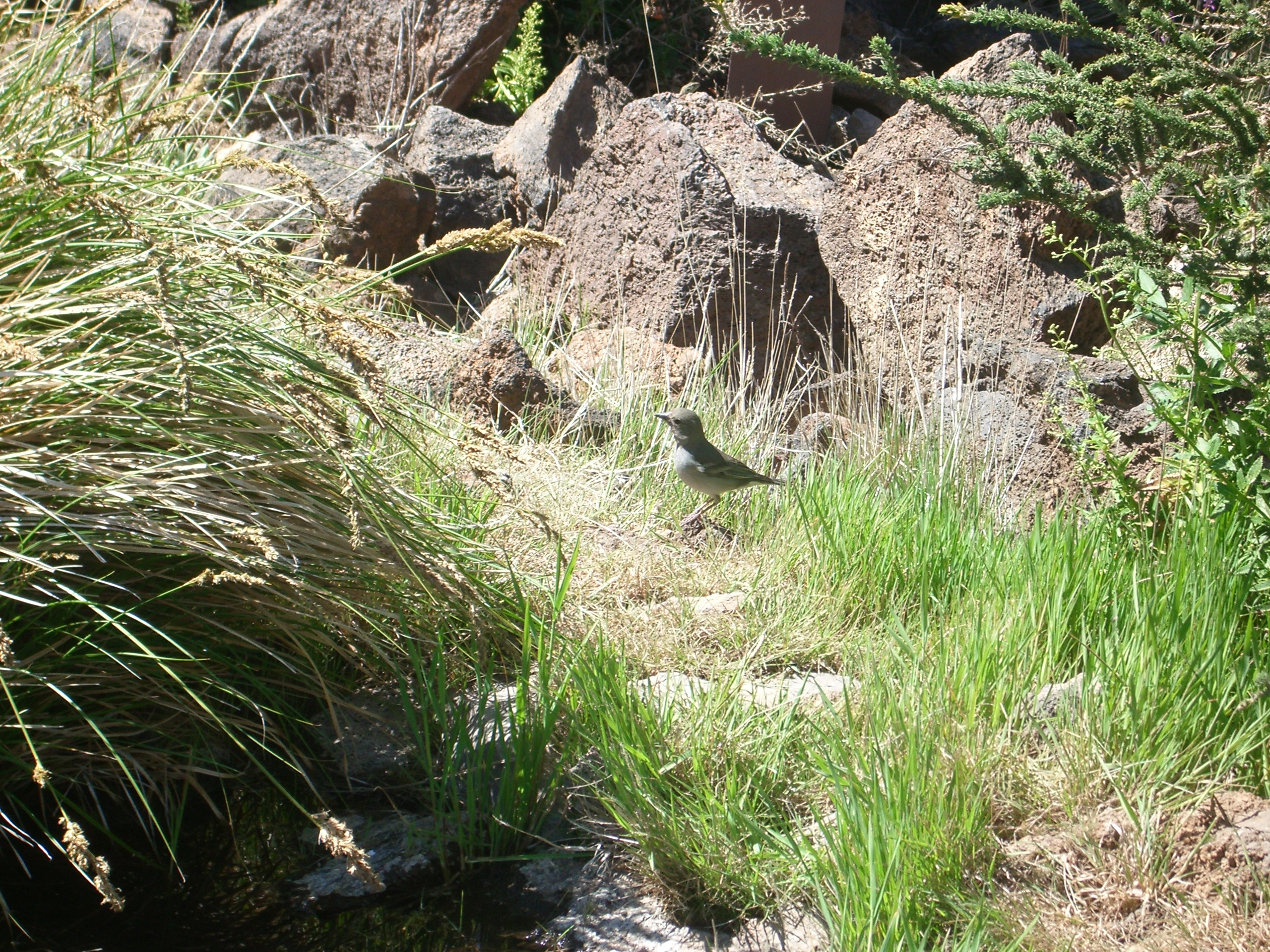 Ave en el Parque Nacional del Teide